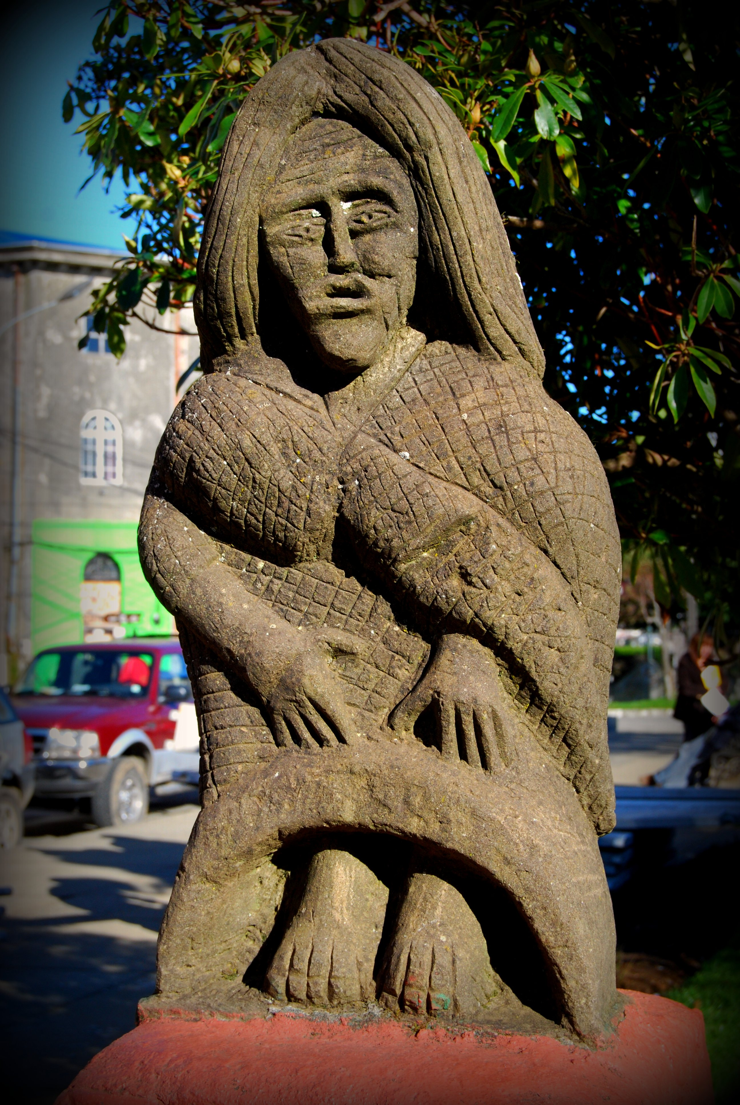 Estatua de la Fiura, en la plaza de Armas de Ancud.